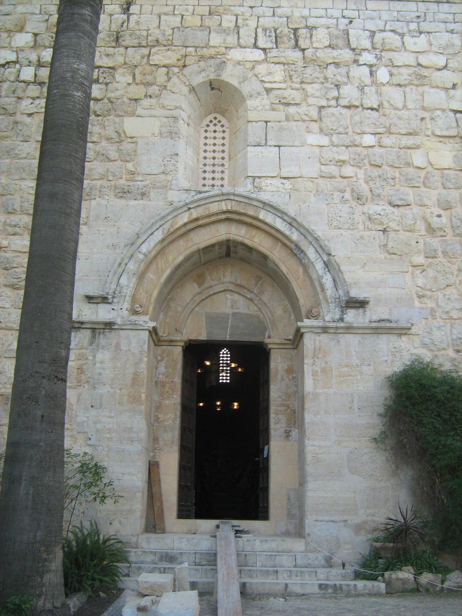 המנזר הבנדיקטיני באבו גוש